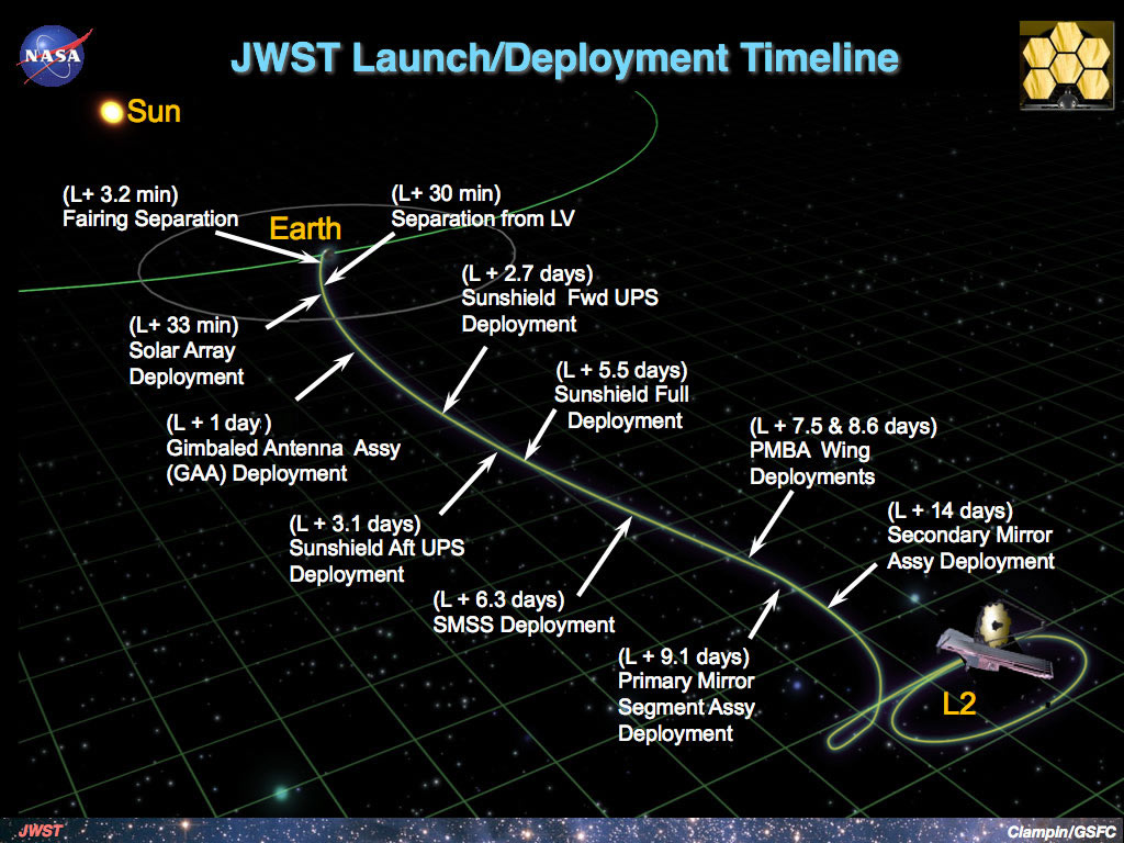 JWST Sequenza di sviluppo